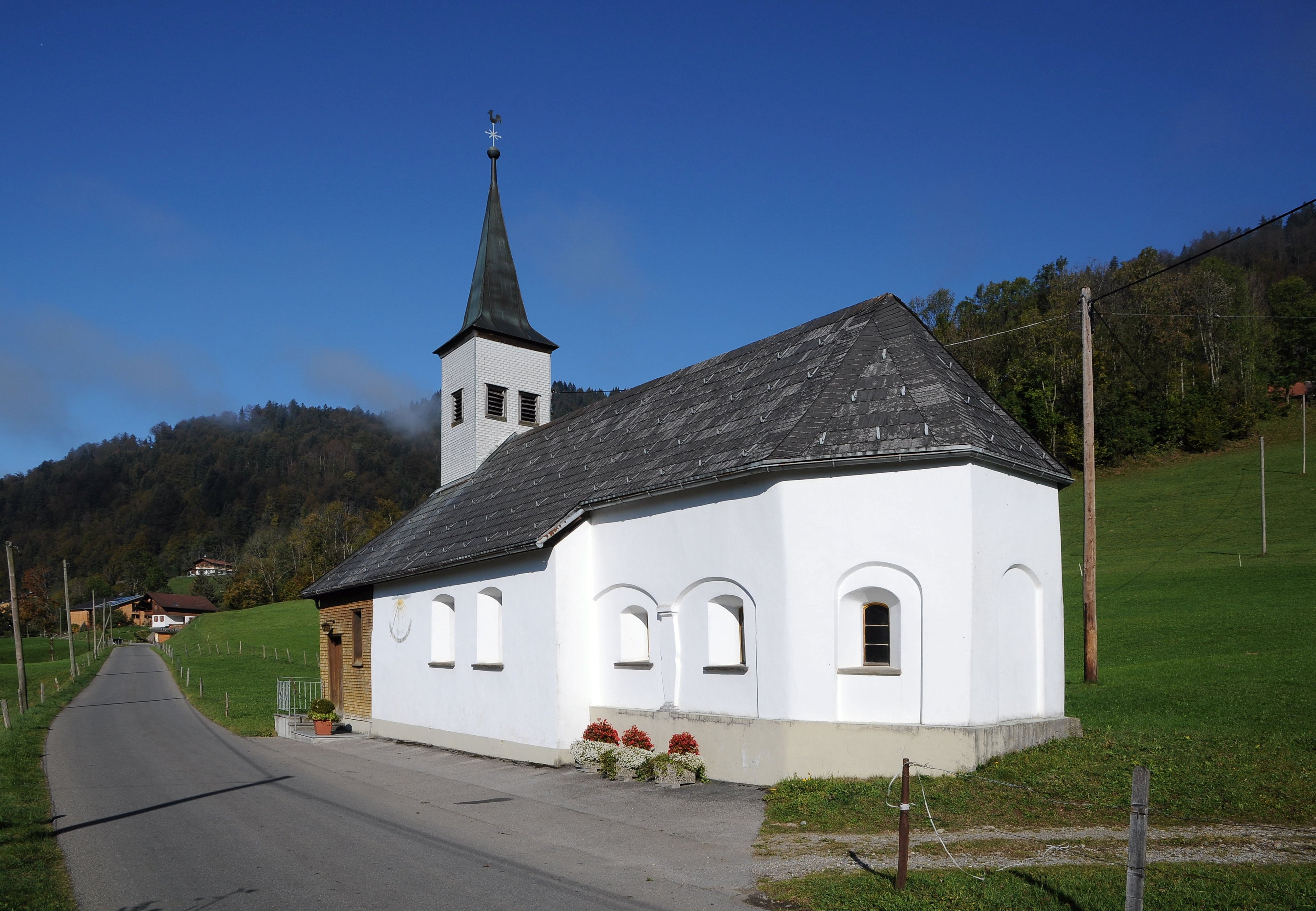 hl. Michael in Reute, in Hittisau. Info Das Objekt steht unter Denkmalschutz.